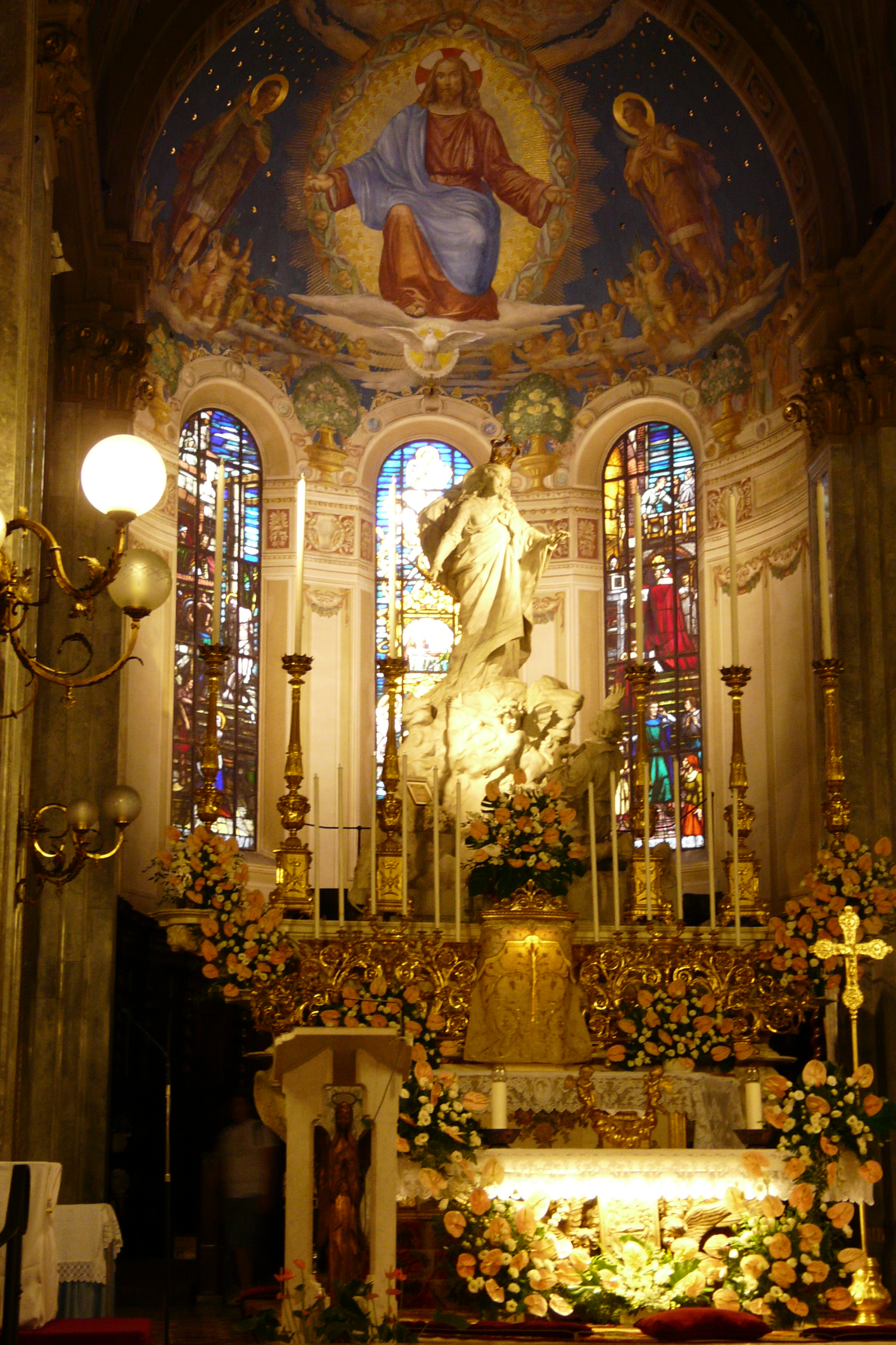 Basilica dei Santi Gervasio e Protasio, altare maggiore, Rapallo, Liguria, Italia